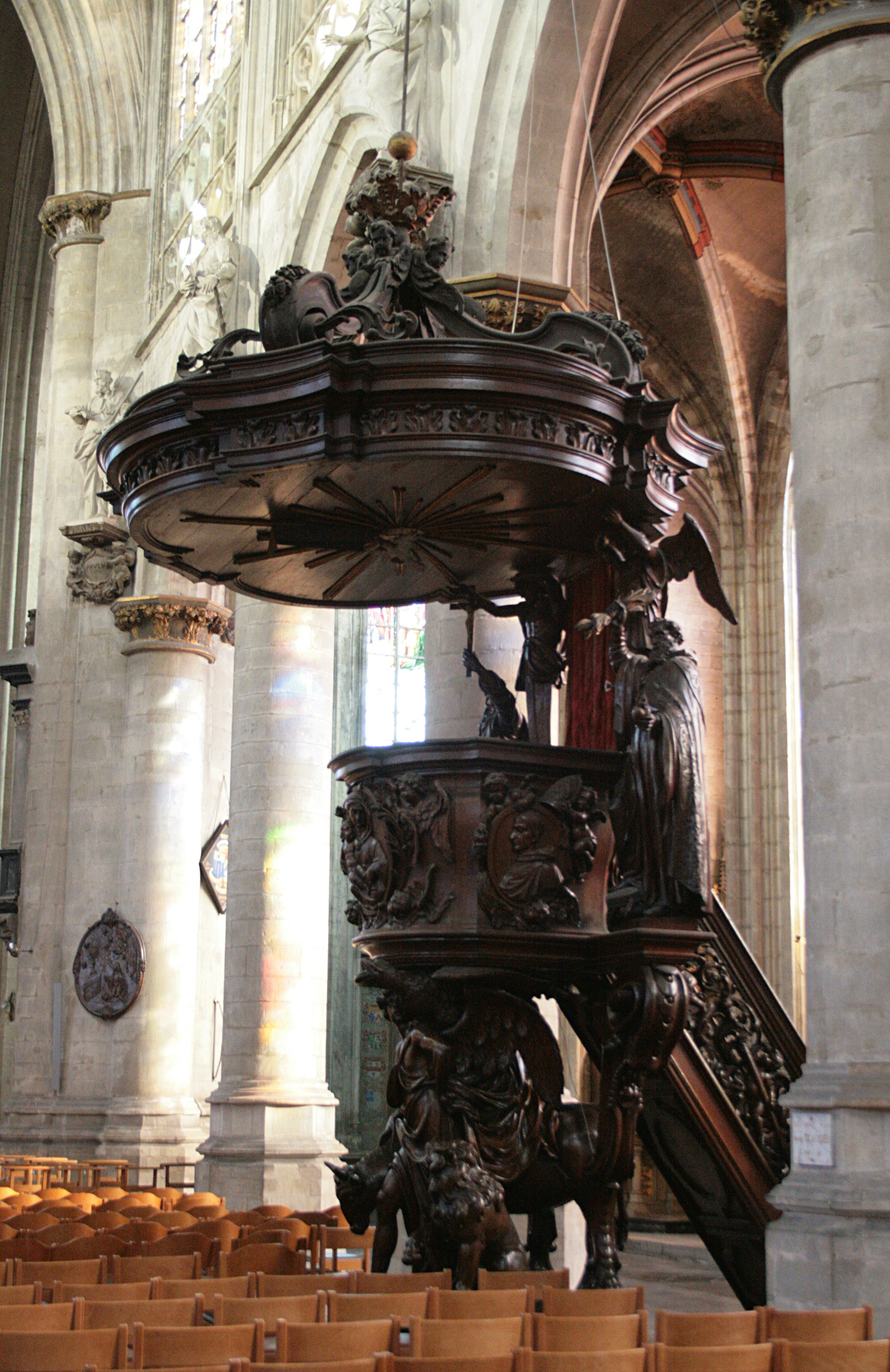 Église Notre-Dame du Sablon, Bruxelles (Belgique). Chaire de vérité baroque réalisée par Marc De Vos en 1697 pour l'église du couvent des Augustins qui se trouvait jadis à l'emplacement de l'actuelle place de Brouckère